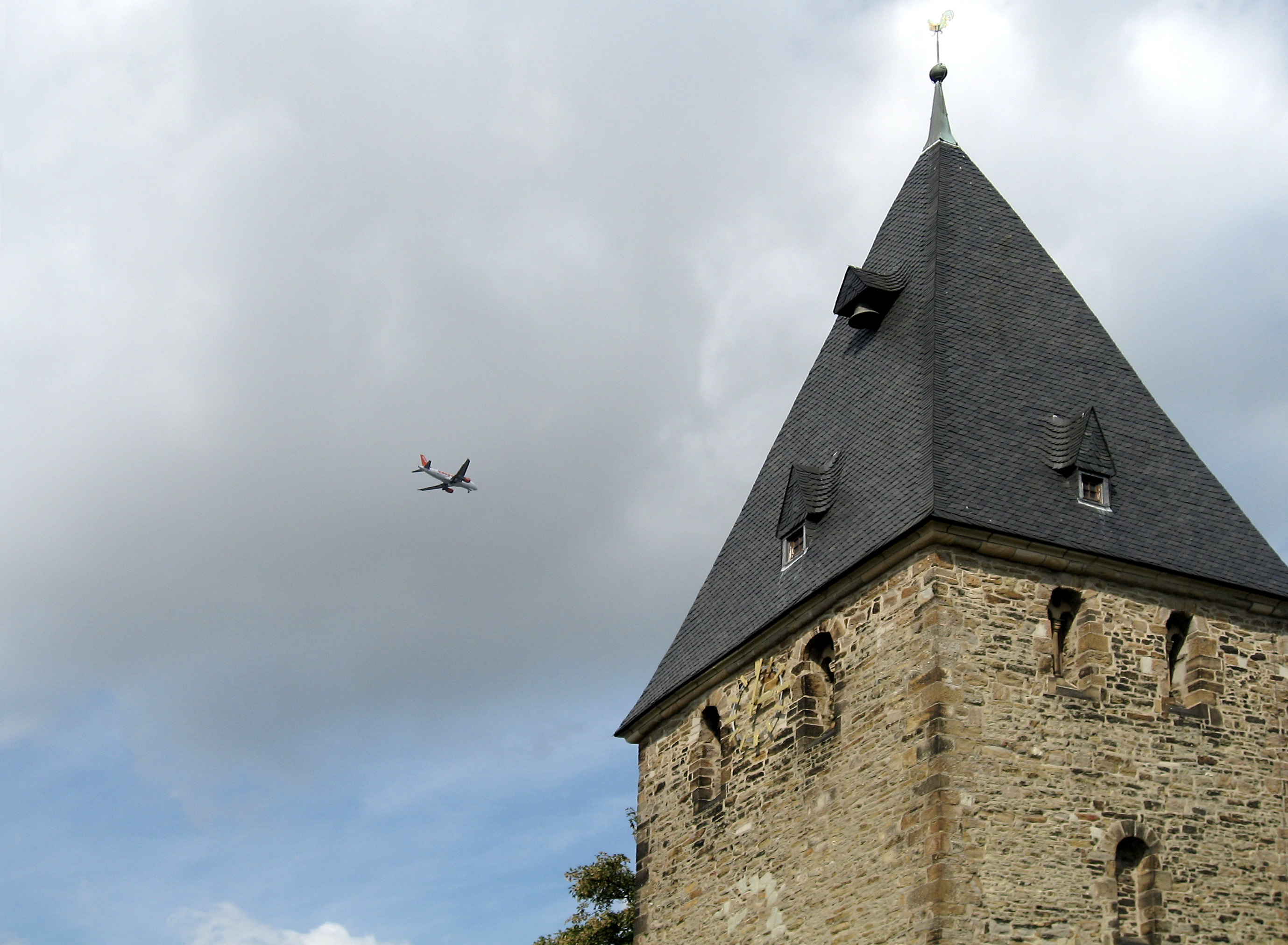 Dortmund, Wellinghofen, Alte Kirche, Turm im Mittelalter Rastort auf dem Pilgerweg nach Syburg Ende 12. Jh. als Kreuzsaalkirche erbaut, Westturm 14. Jh: Erweiterung zur einjochigen Hallenkirche, Apsis durch rechteckigen Chor ersetzt, der im 19. Jh neugotisch erweitert wurde 1977-79 restauriert, unter anderem der Fragmente der Bemalung